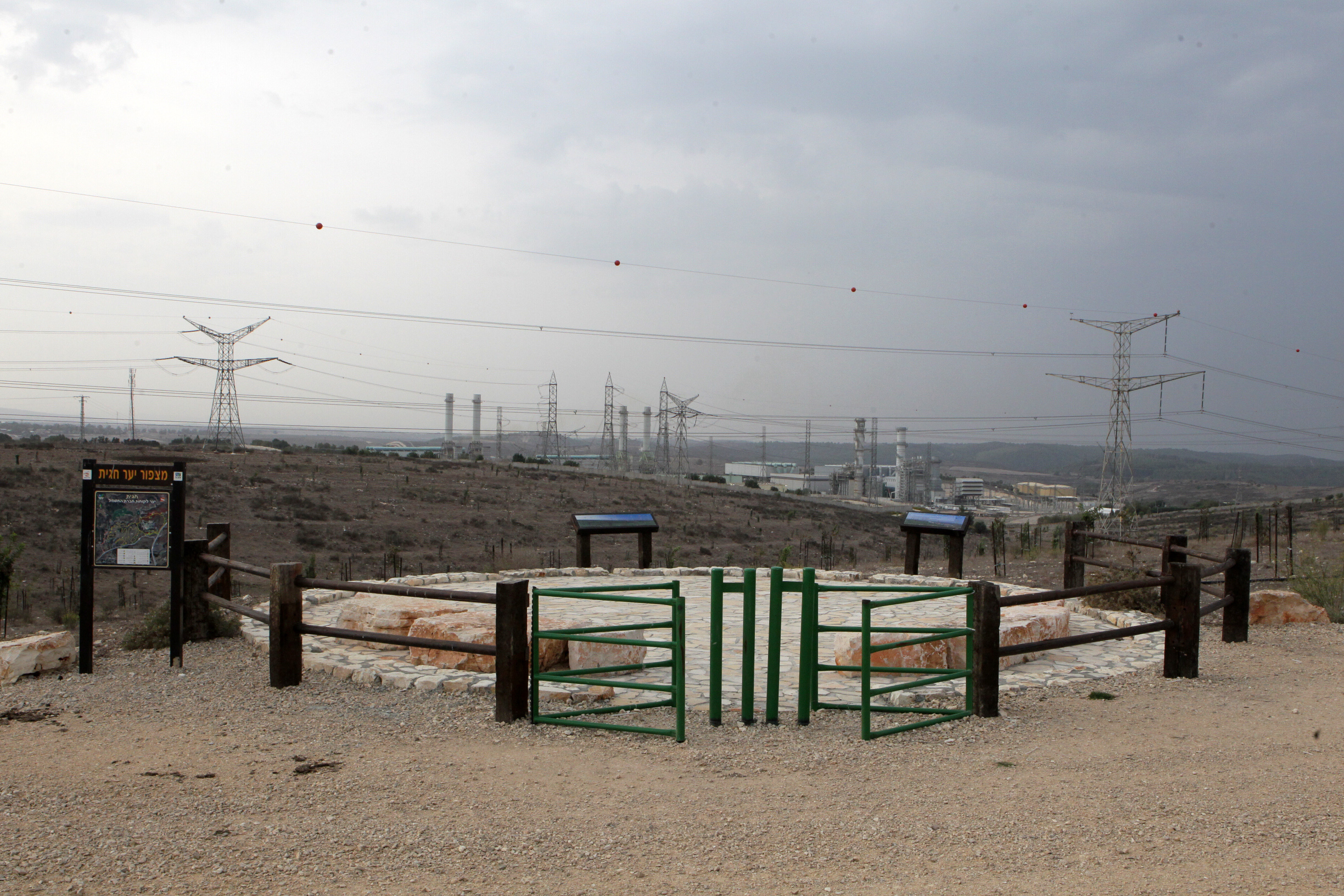 תחנת הכוח חגית